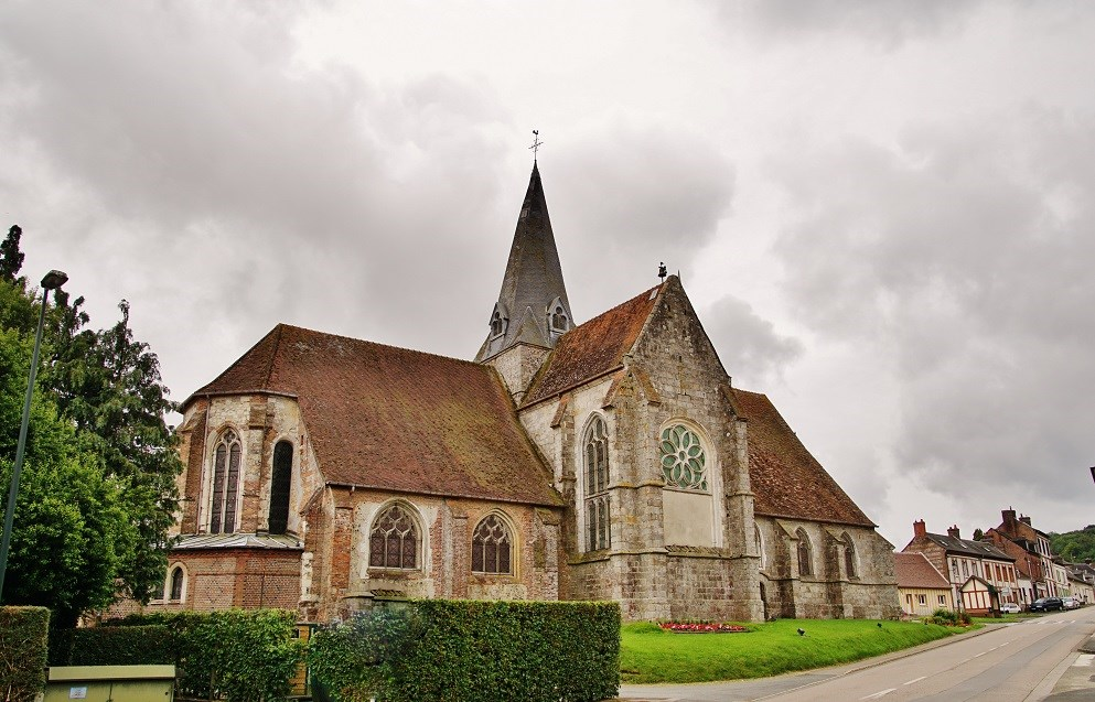 église St Eloi